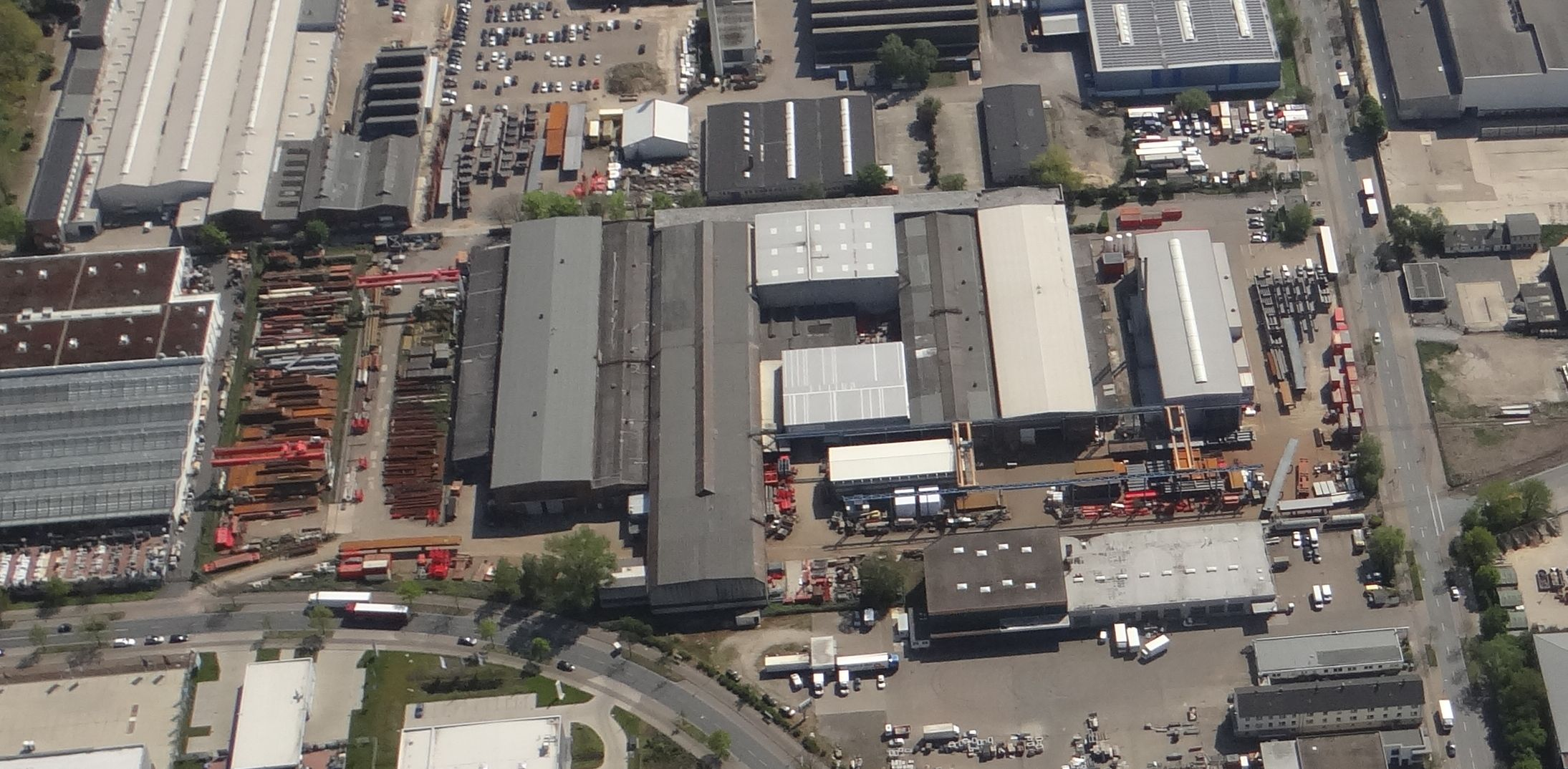 Luftbild der damaligen (2016) Eiffel Deutschland Stahltechnologie GmbH, Hannover, in Blickrichtung Süden. Links unten der Industrieweg, rechts vertikal die Hackethalstraße. Das Unternehmen firmiert heute (2020) als SEH Engineering GmbH mit mehreren Tochterfirmen.